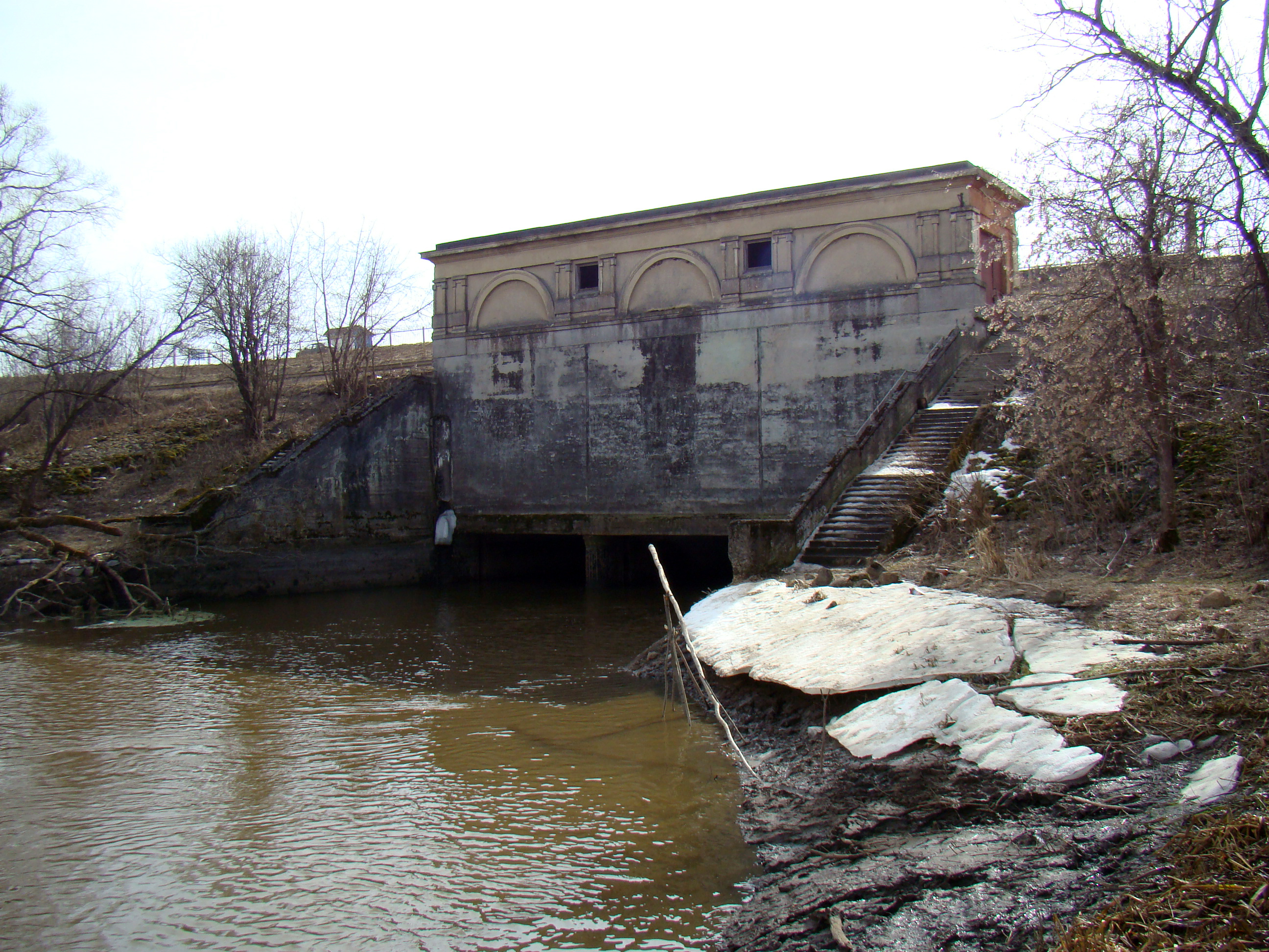 Река Сестра под каналом Москва-Волга